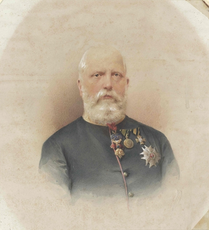 (1835 - 1908) Großherzog Ferdinand IV. von Toskana.